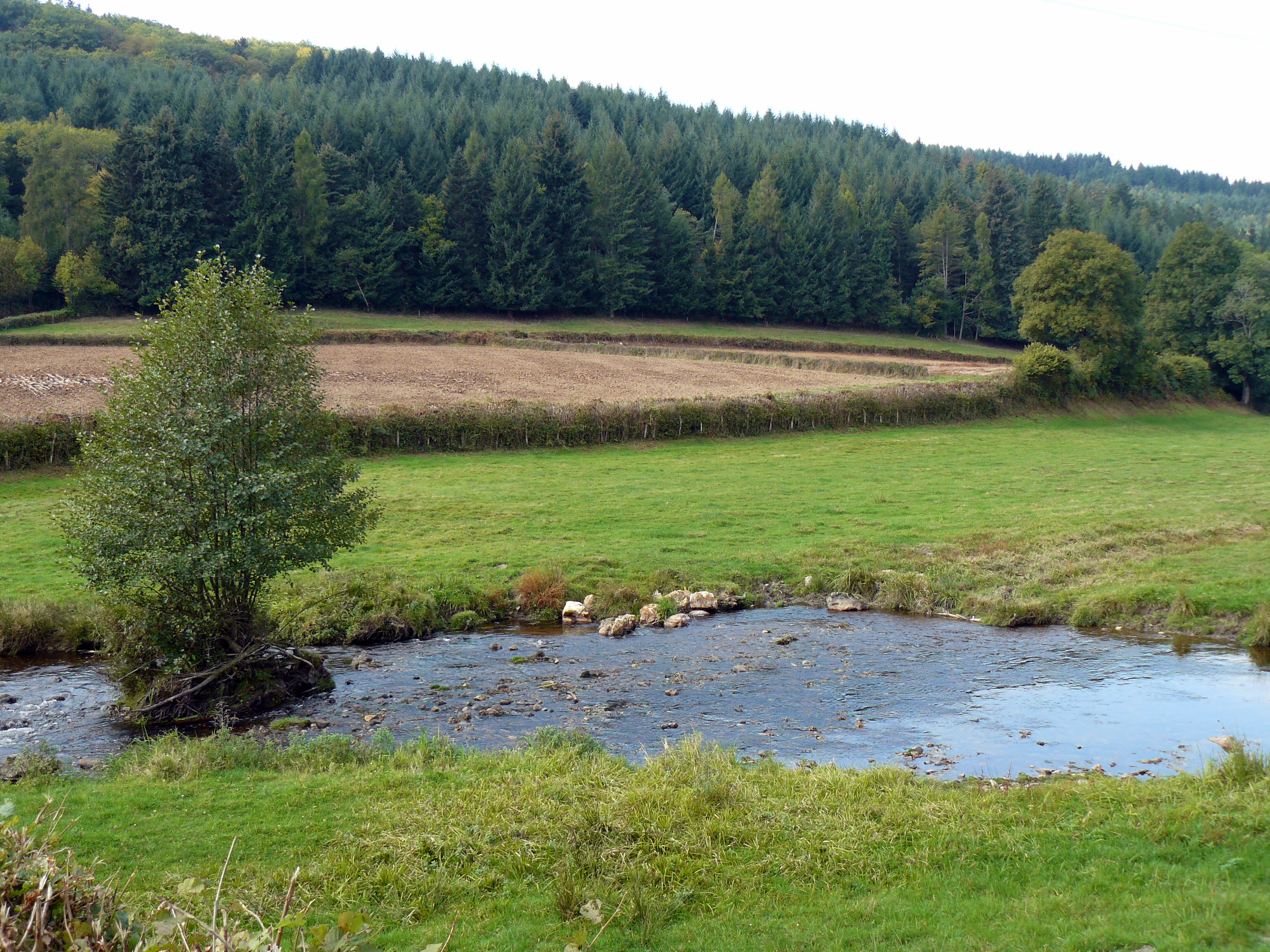 La Chaloire, entre La Petite-Verrière et La Celle-en-Morvan (Saône-et-Loire, France)